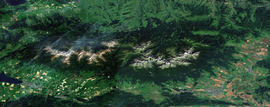 Muntii Tatra vazuti din spatiu.